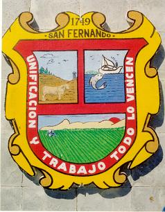 Escudo de Armas de San Fermando Tamaulipas